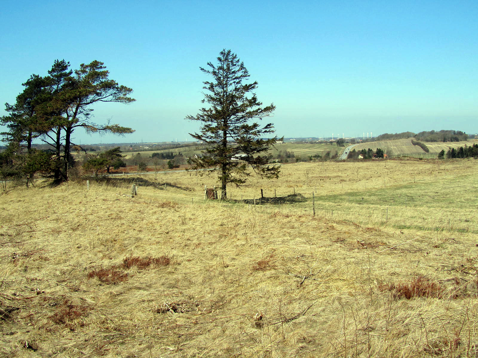 Himmerlandske Heder, Vindblæs Hede set mod nord